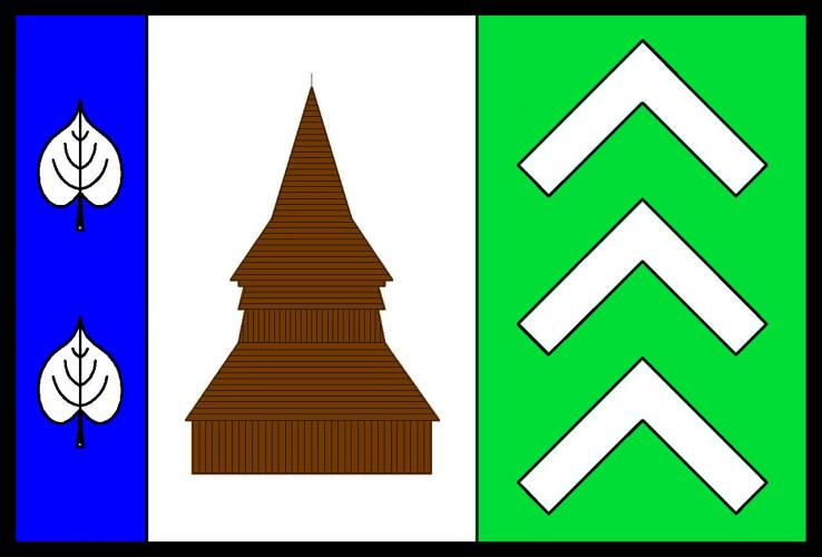 vlajka, Vilantice, okres Trutnov